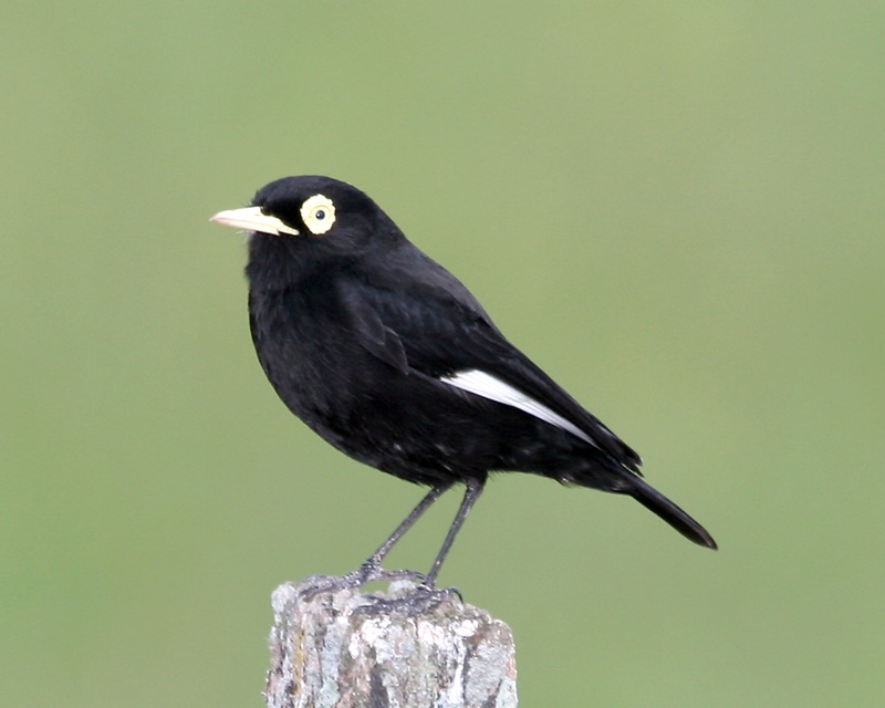 Spectacled Tyrant (Hymenops perspicillatus), Entre Rios, Argentina